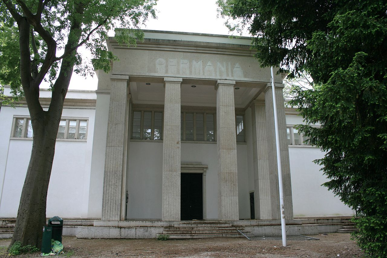 Padiglione Germania alla Biennale di Venezia